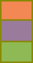 Echelle des 3 couleurs disponibles sur les calculatrices CASIO Graph 65, 65+, 85.